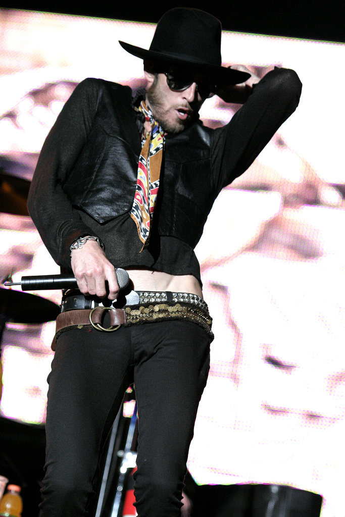 Velvet Revolver - Scott Weiland